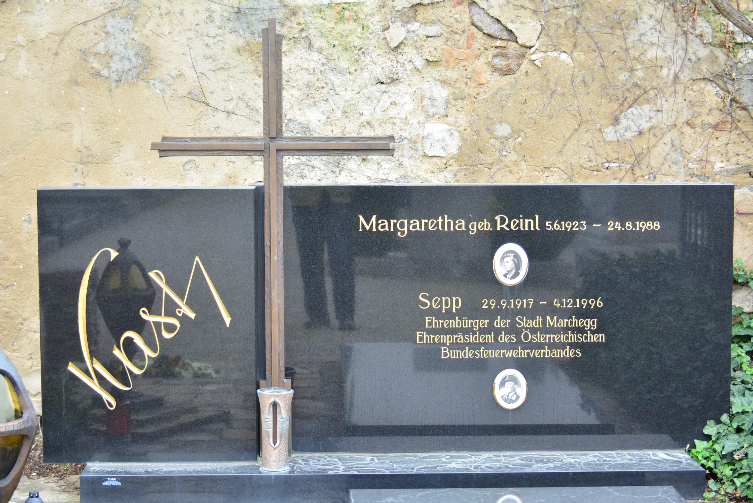 Grab von Sepp Kast auf dem Friedhof von Marchegg in Niederösterreich